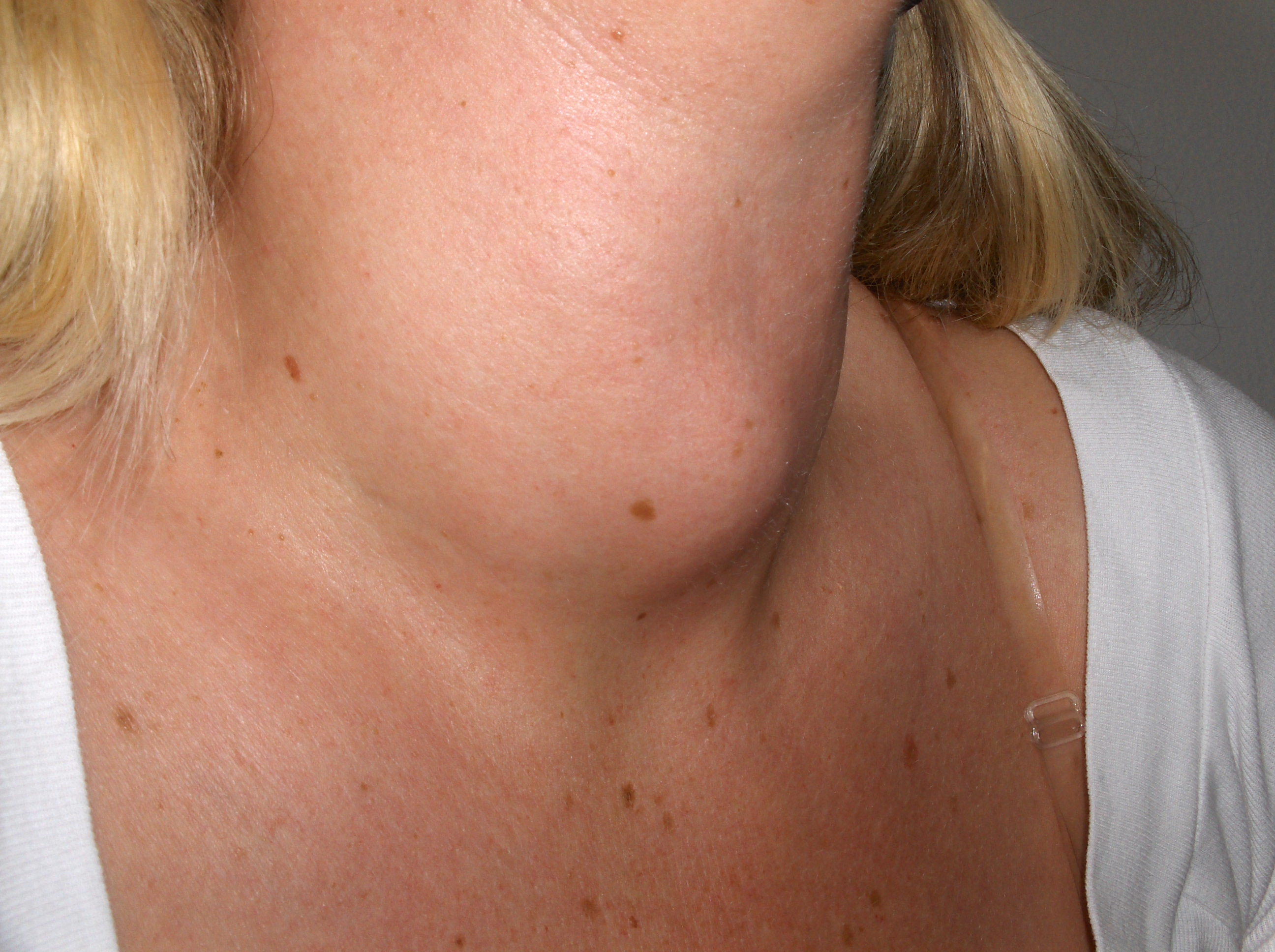 Struma mit großem tastbarem Knoten prätracheal